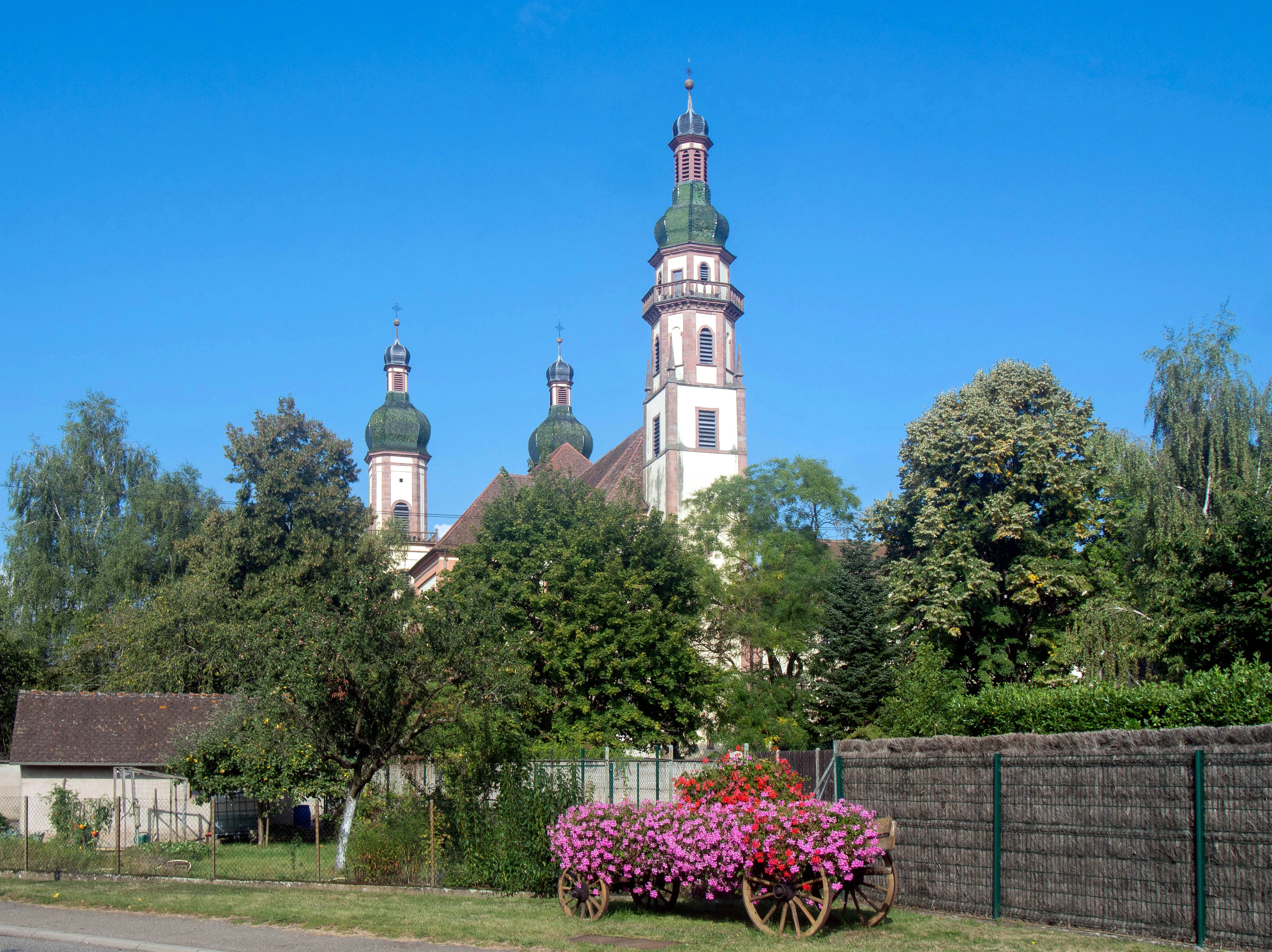 Die ehemalige Benediktinerabteikirche Ebersmunster